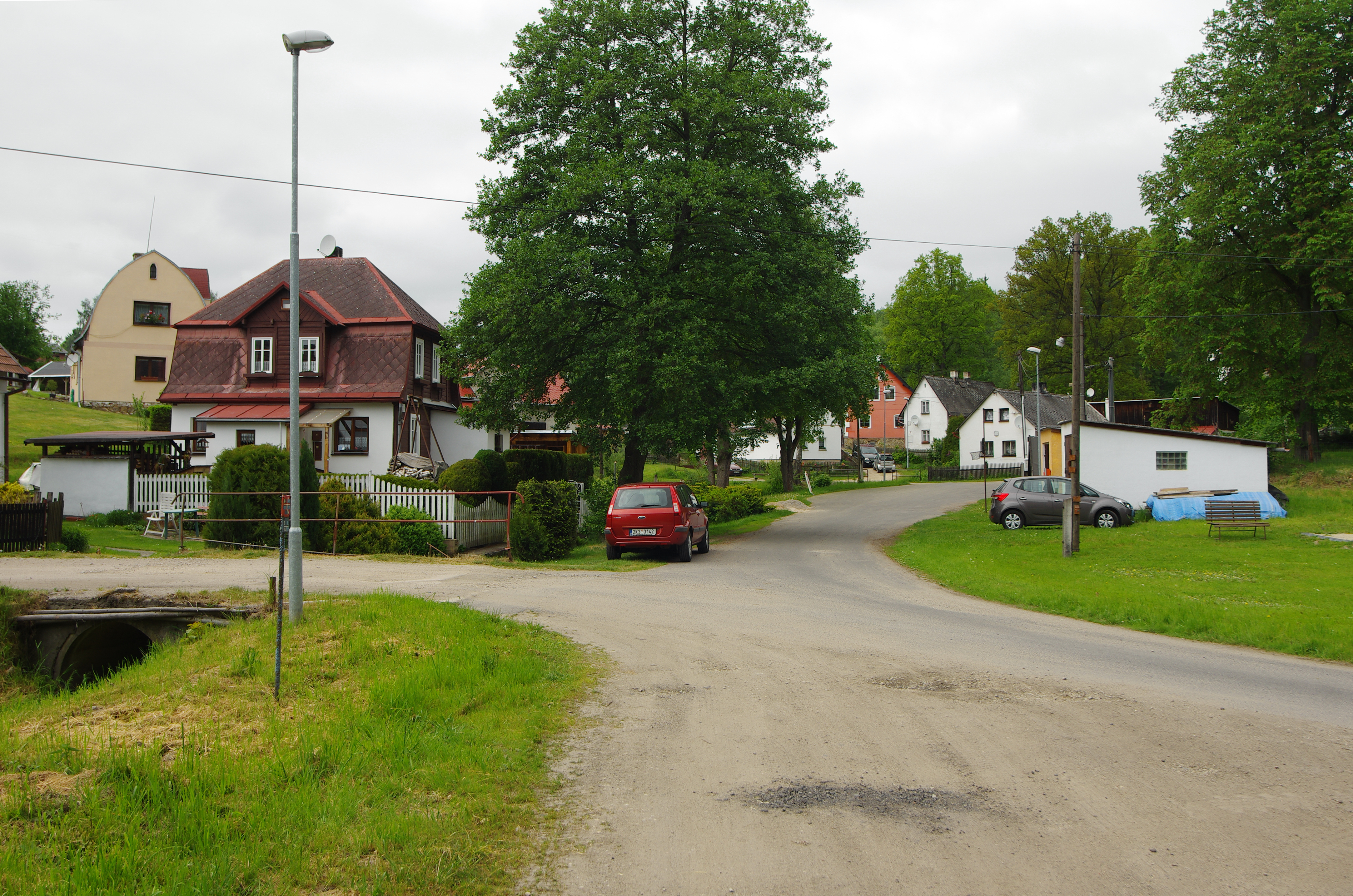 Radvanov, část obce Josefov, okres Sokolov